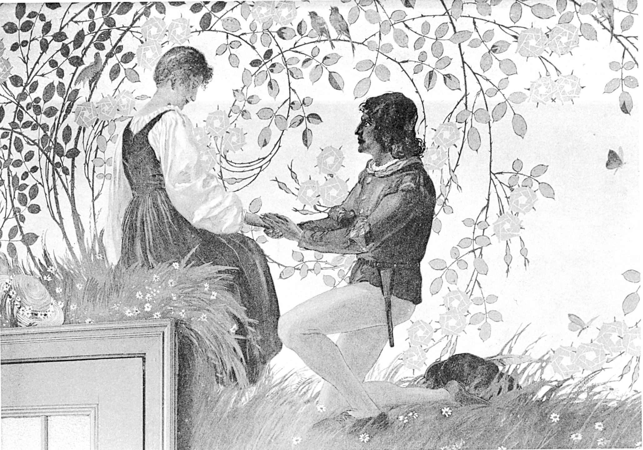 Heilbronn, Altes Rathaus, Neue Kanzlei, 1.Wandgemälde im Trauzimmer von Adolf Amberg (* 31. Juli 1874 in Hanau; † 3. Juli 1913 in Berlin), Detail.JPG